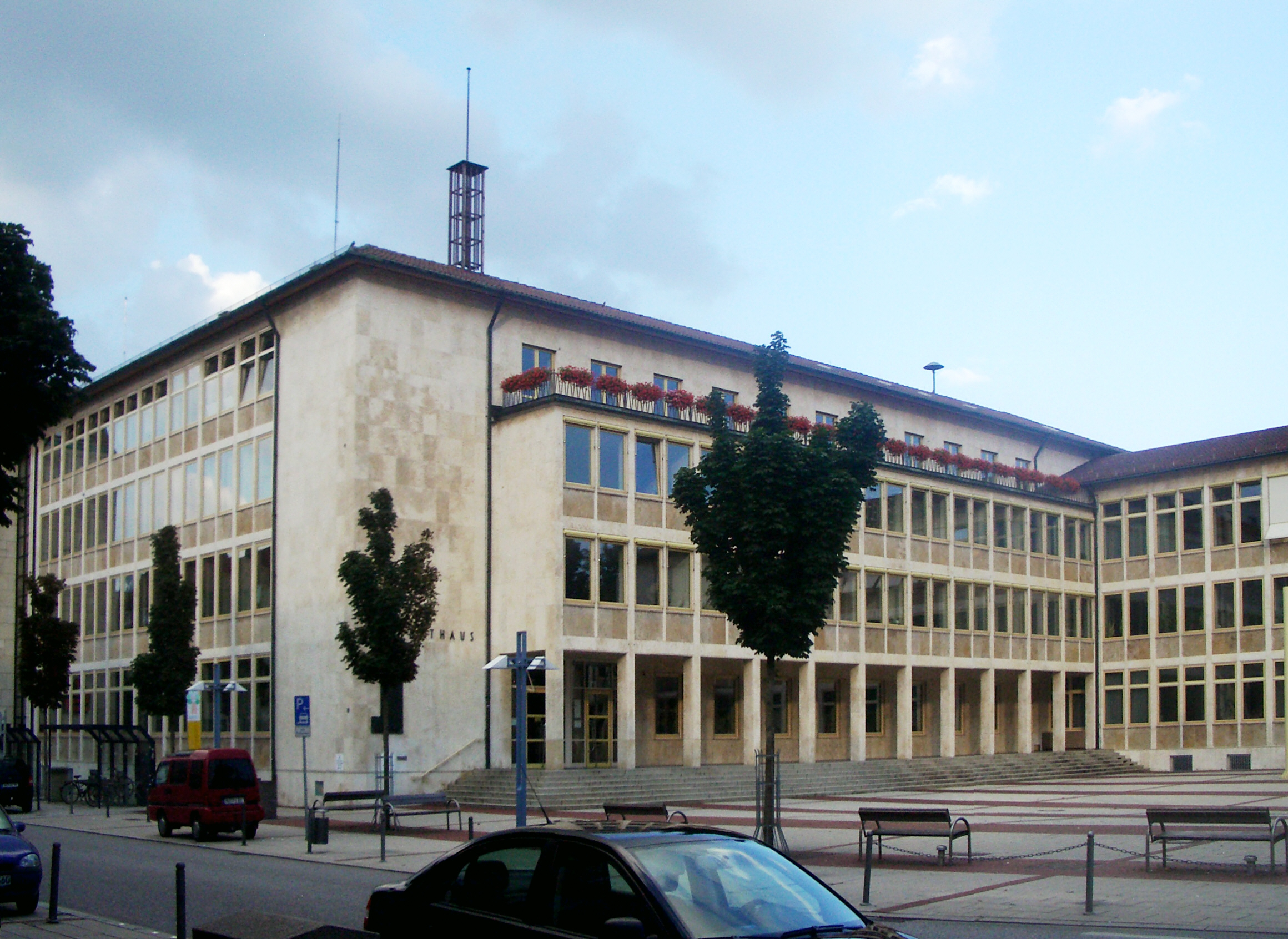 Neu-Ulm, Rathaus